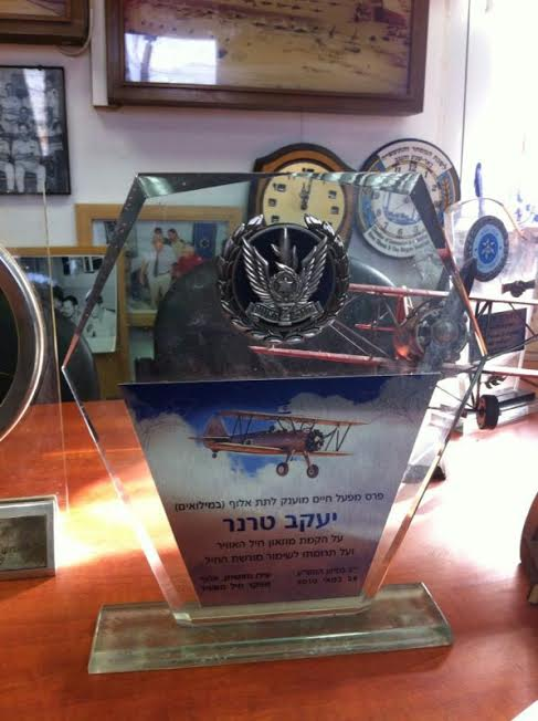 פרס מפעל חיים על הקמת מוזיאון חיל האוויר ושימור מורשת החיל